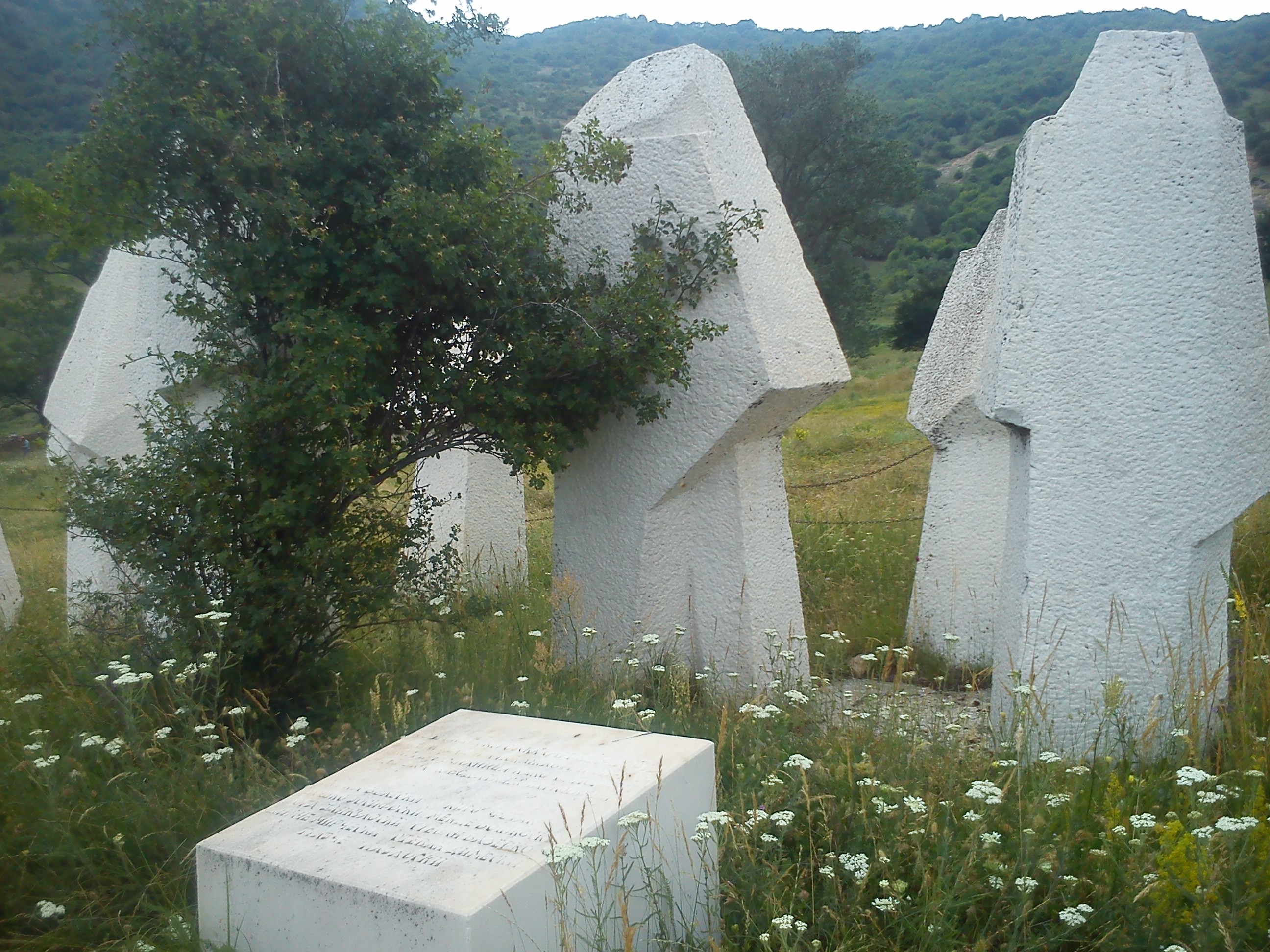 Споменикот во близина на Манастирот „Свети Никола“, подигнат во чест на деветмината загинати борци на партизанскиот одред „Ѓорче Петров“ на 19 Декември 1942 г. Манастирот „Свети Никола“ се наоѓа во близина на с. Прилепец - Прилеп. Манастирот е изграден во 1872 година.